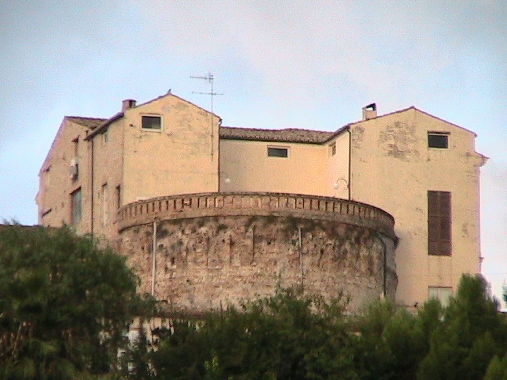 Giulianova - Fortificazioni